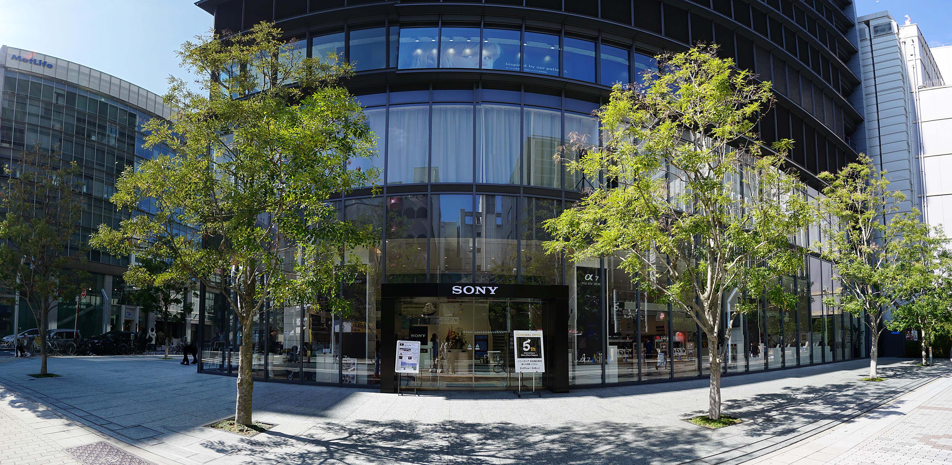 SONY Store , ソニーストア 名古屋